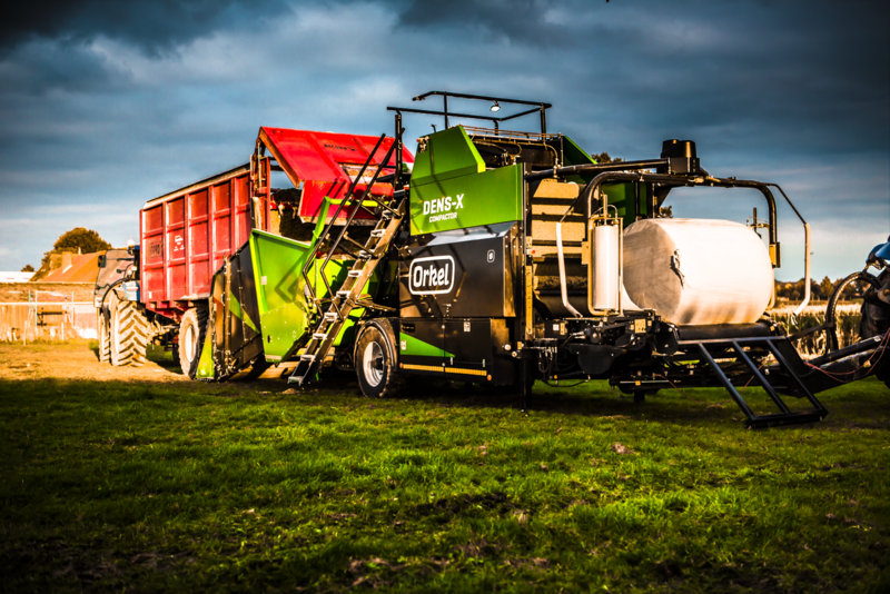 Orkel Dens-X Compactor